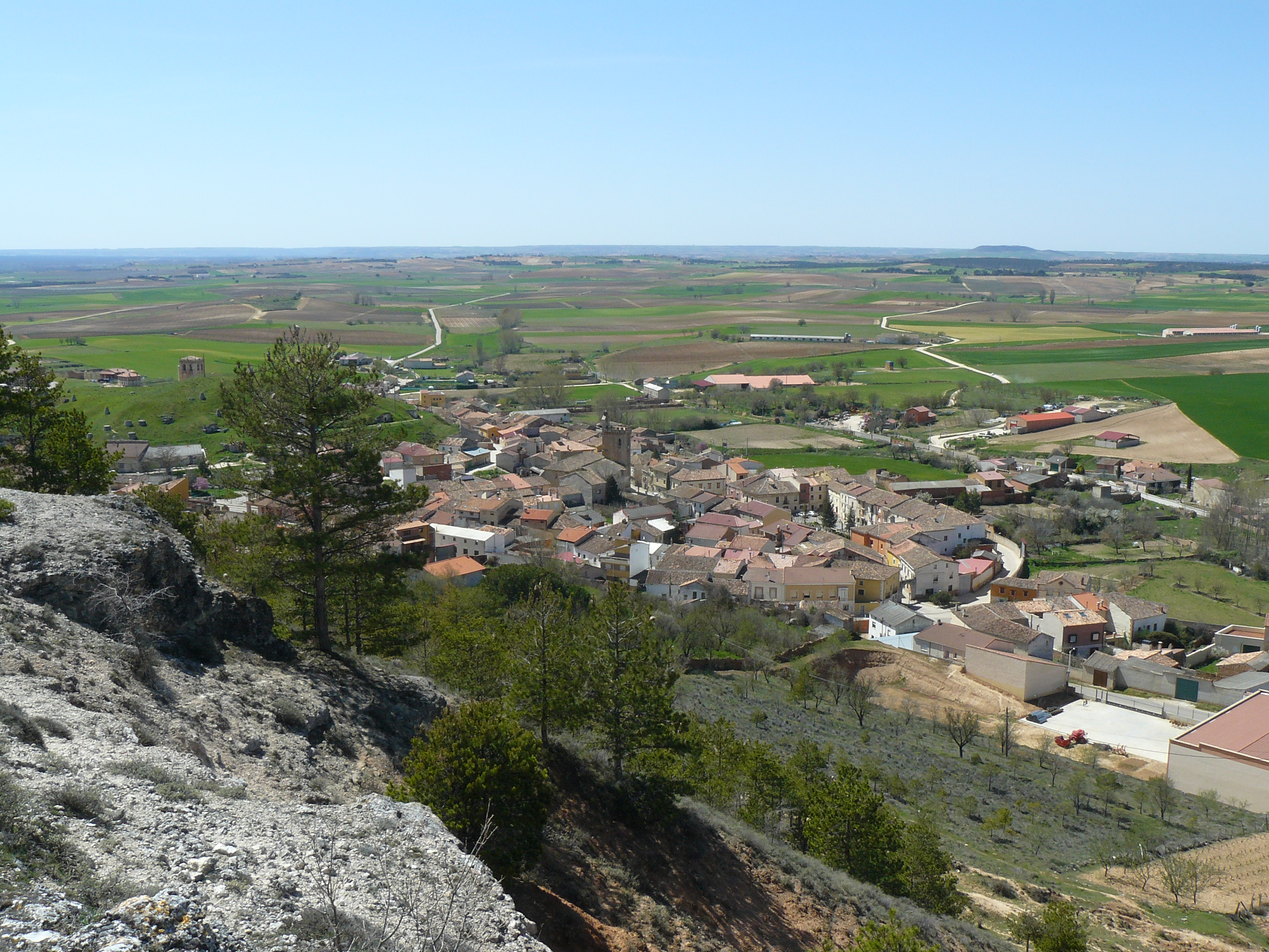 Gumiel del Mercado, Burgos.